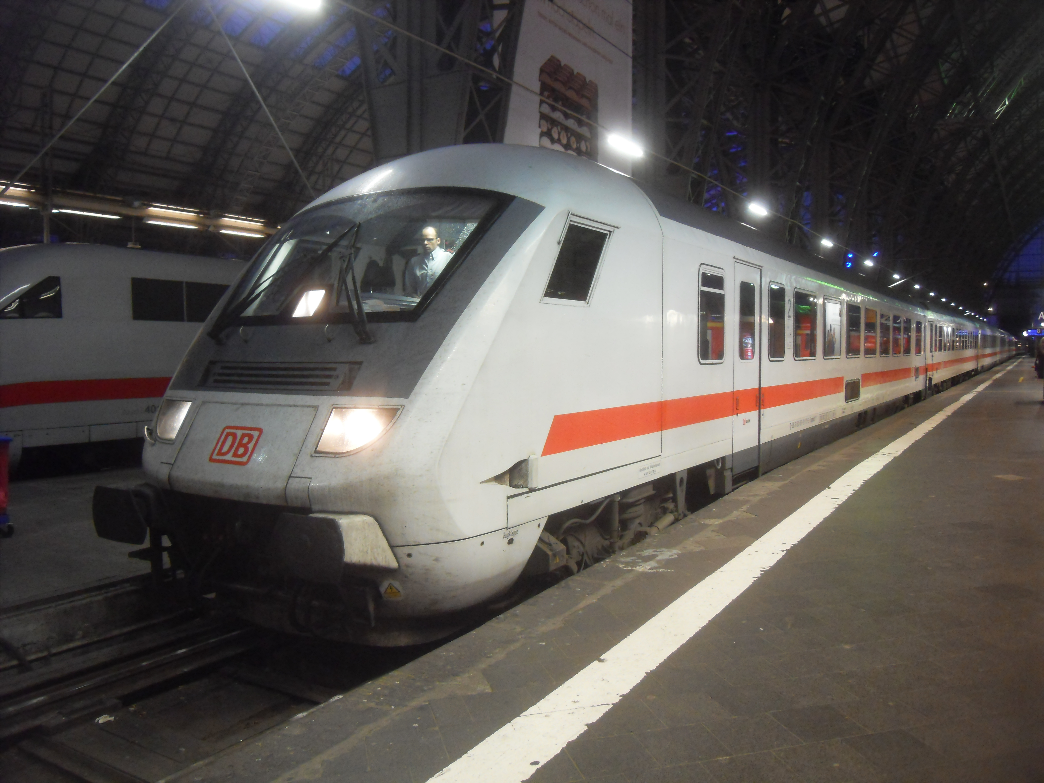 InterCity im Gleis 10 des Frankfurter (Main) Hauptbahnhofs